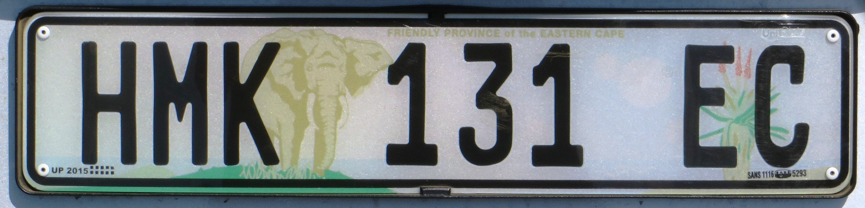 Kentekenplaat Eastern Cape